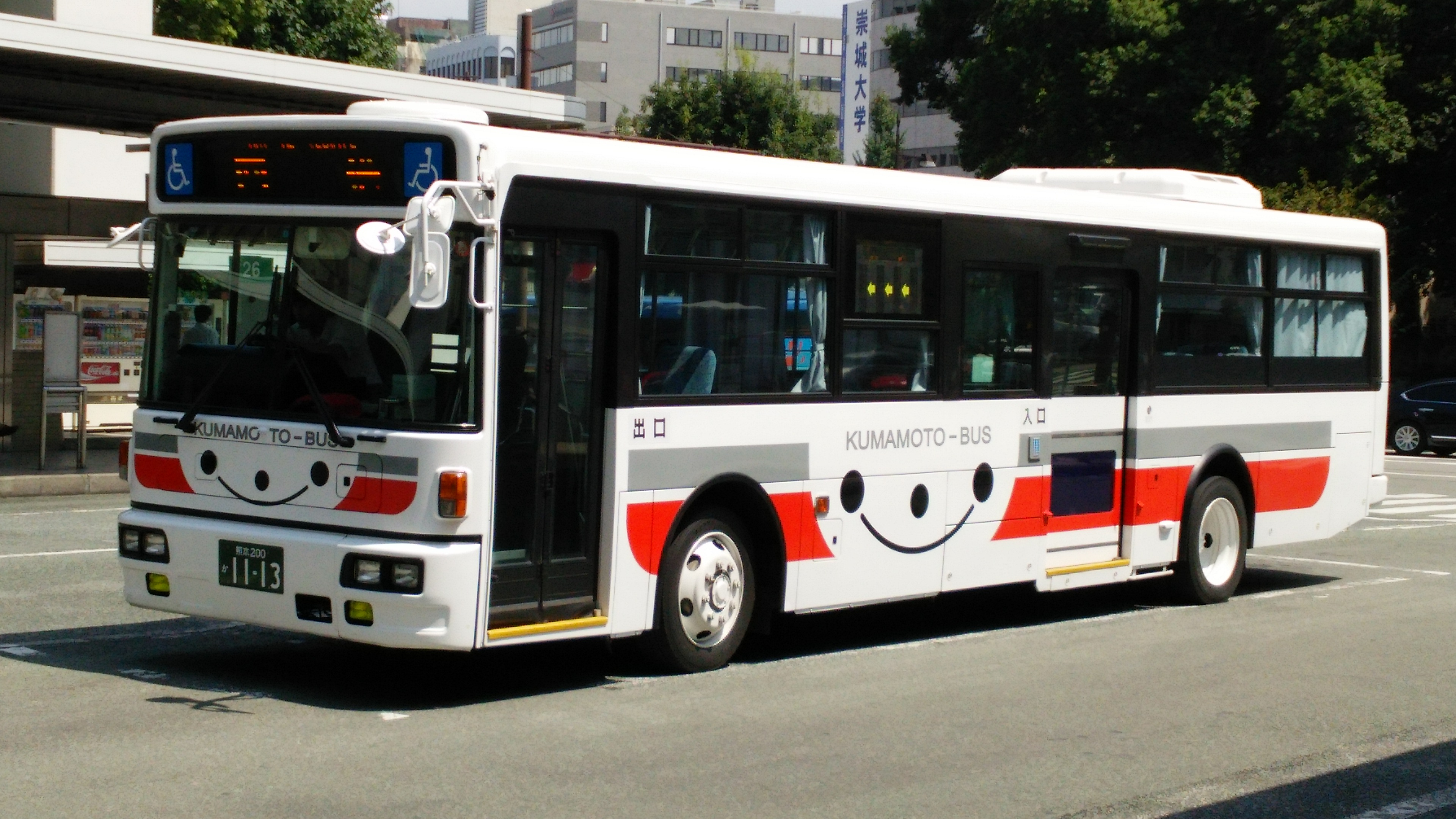 一般路線車（新塗装）